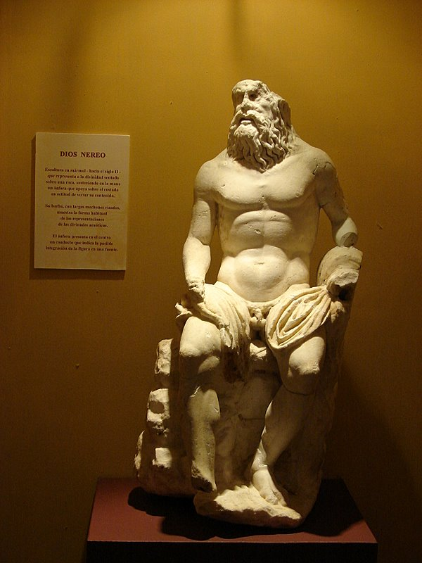 Escultura del dios Nereo en el Museo Arqueológico de Carmona (Sevilla).